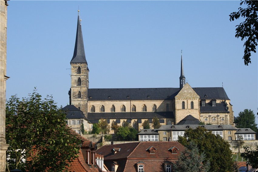 Kloster und Kirche Michaelsberg, Bamberg